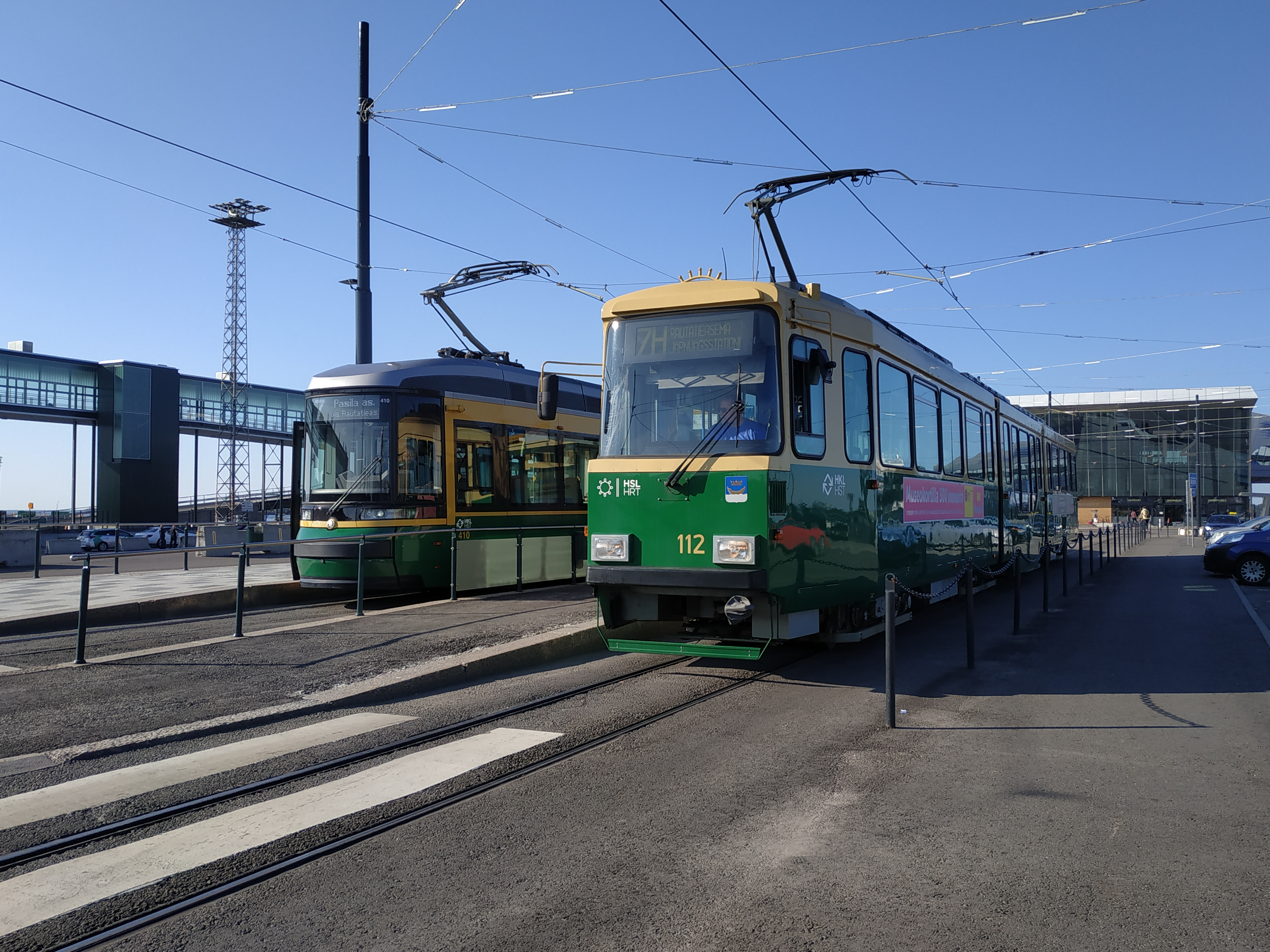 Tramways d'Helsinki au terminal voyageur du port d'Helsinki